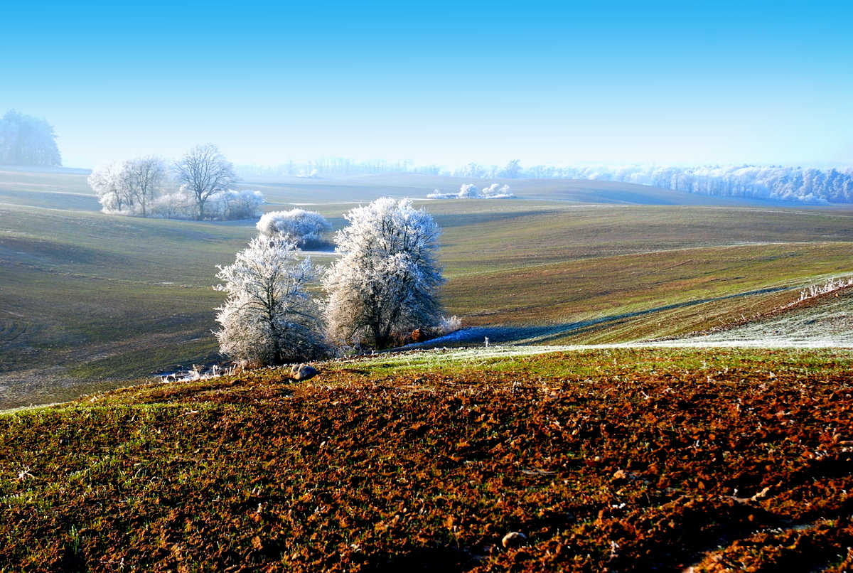 Bäume im Rauhreif in der Petznicker Feldflur